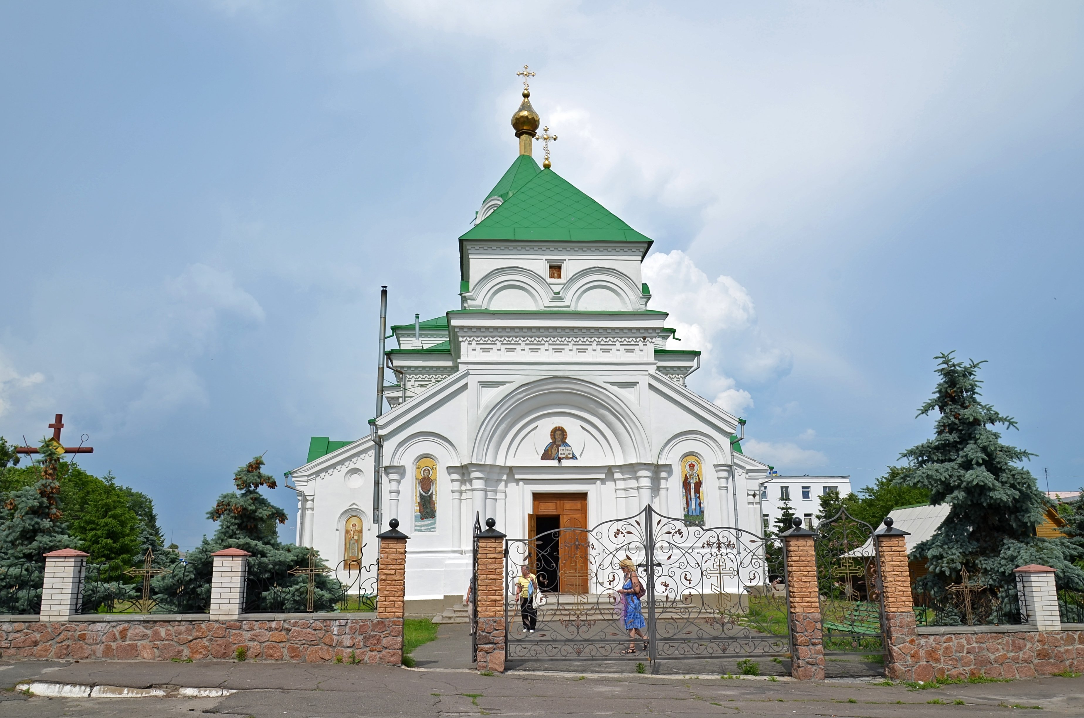 Святомиколаївський собор, Радомишль, майдан Соборний